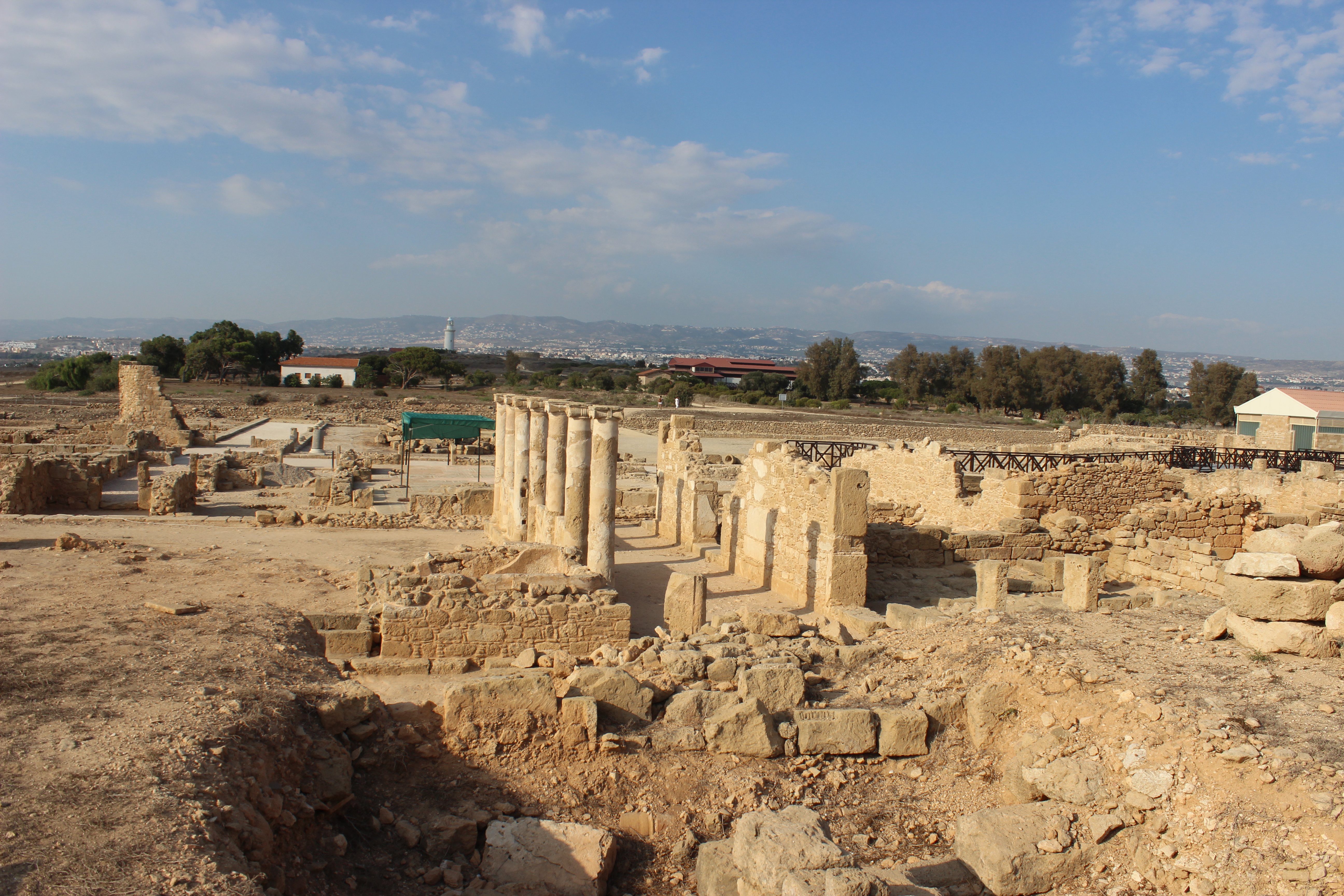 Археологический парк Като Пафос